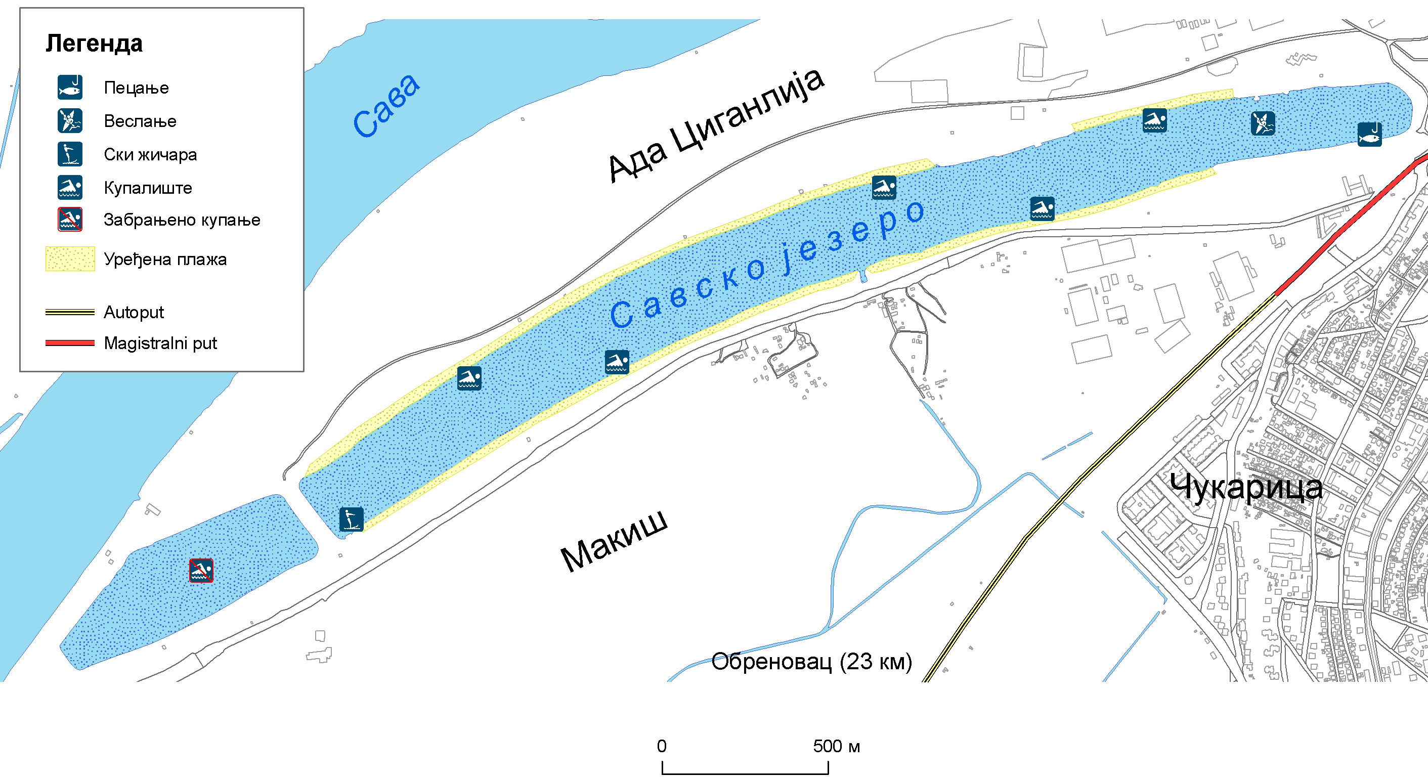 Мапа Савског језера